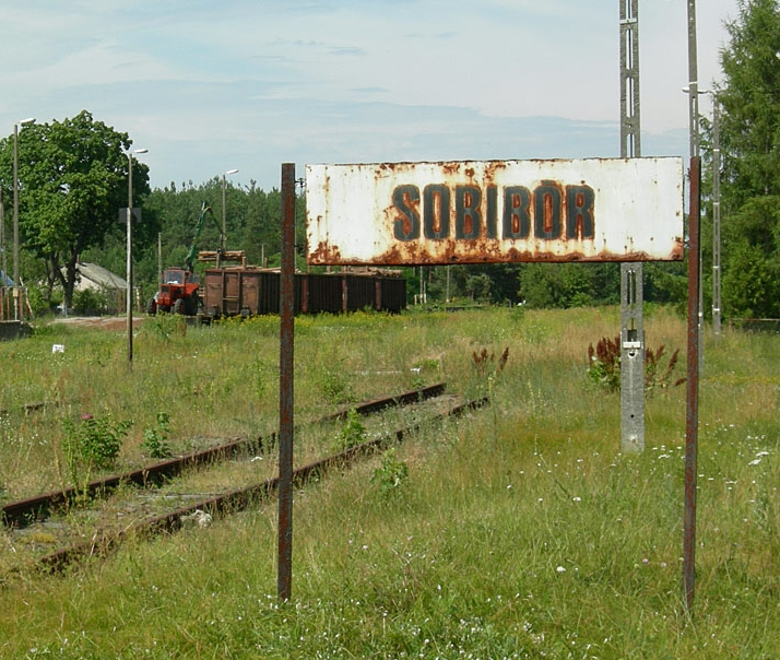 Gare de Sobibór